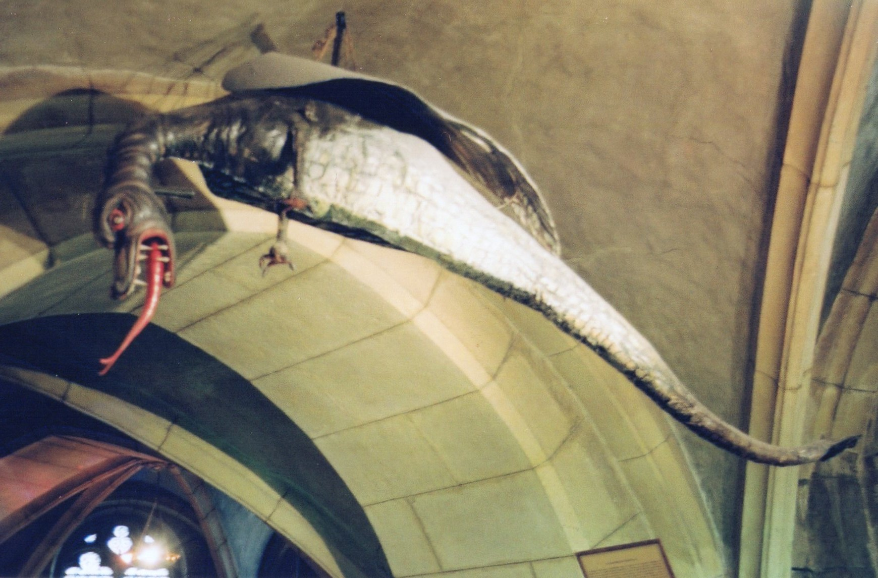 Effigie du Graoully conservée dans la crypte de la cathédrale Saint-Etienne de Metz, France.